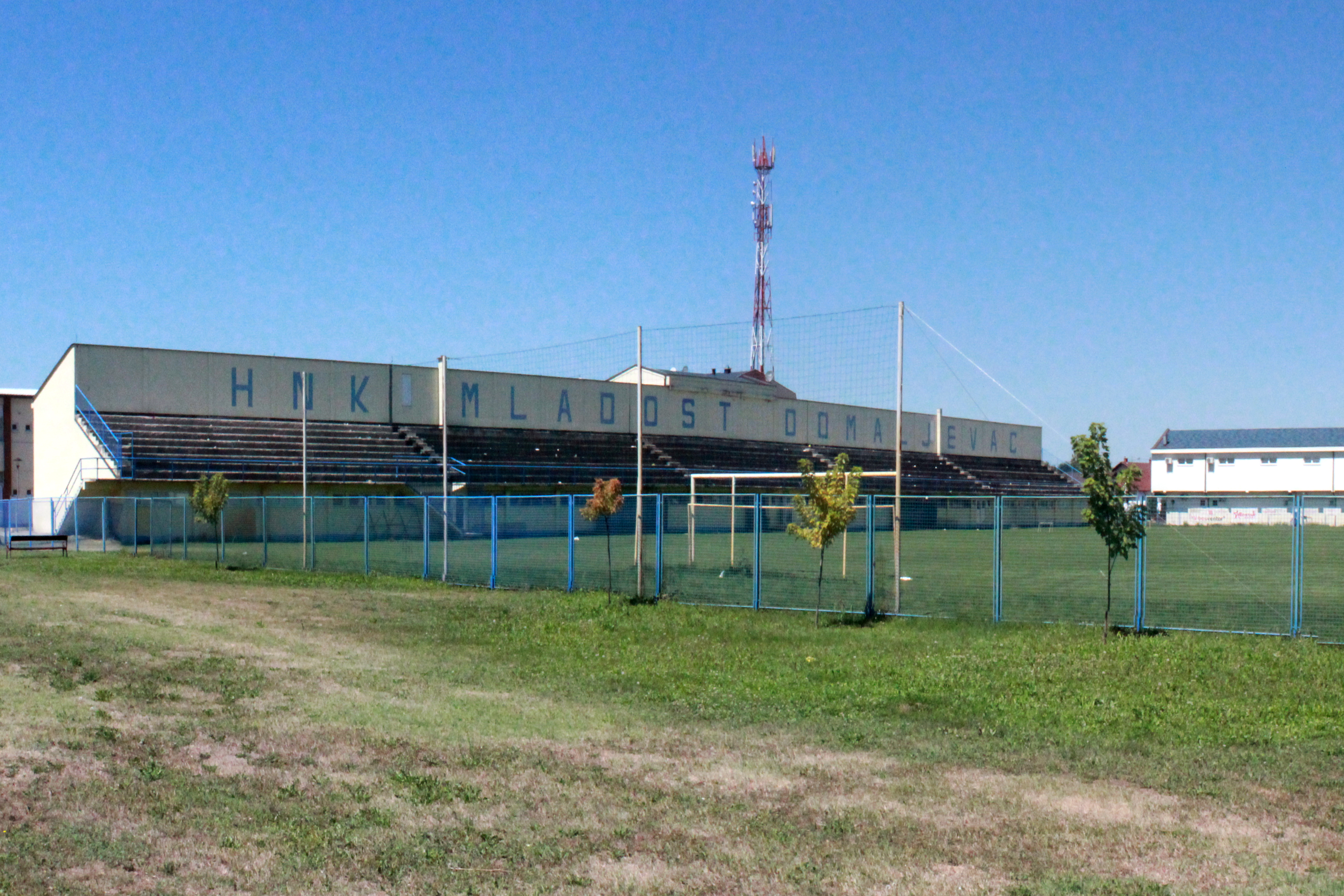 Football Stadium Jelas in Domaljevac in the year 2017